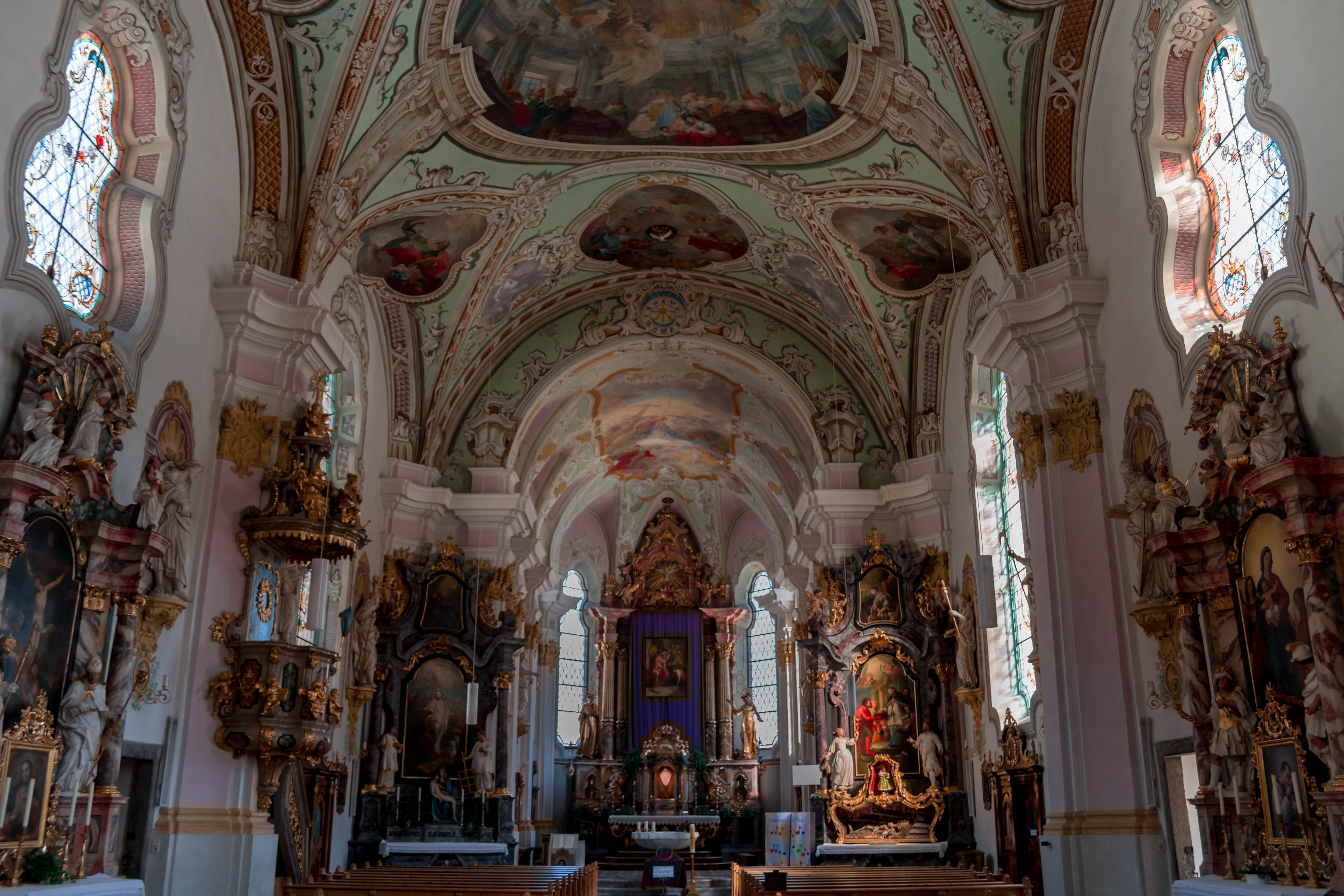 Altar der Dekanatspfarrkirche Sillian